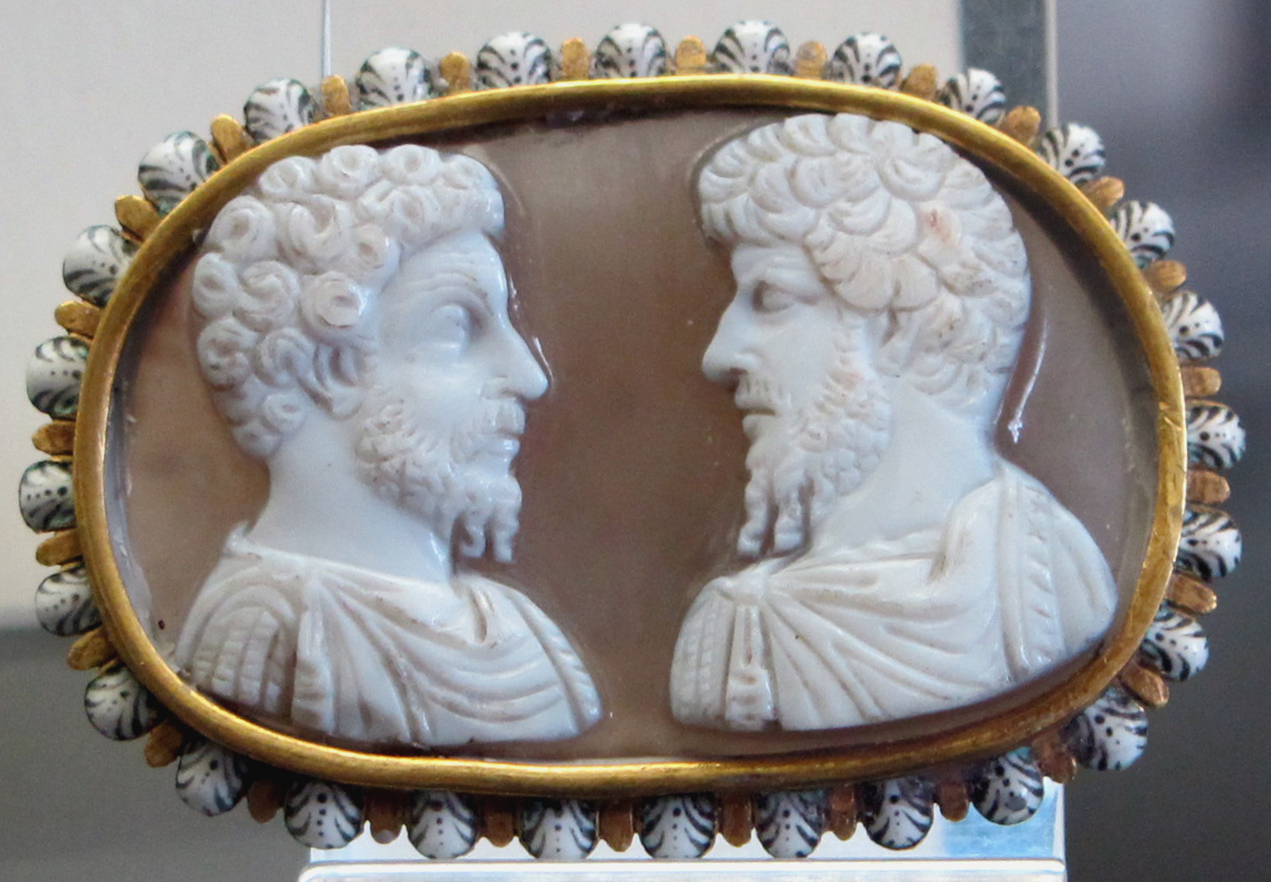 Arte romana, marc'aurelio e lucio vero su agata-onice, II sec